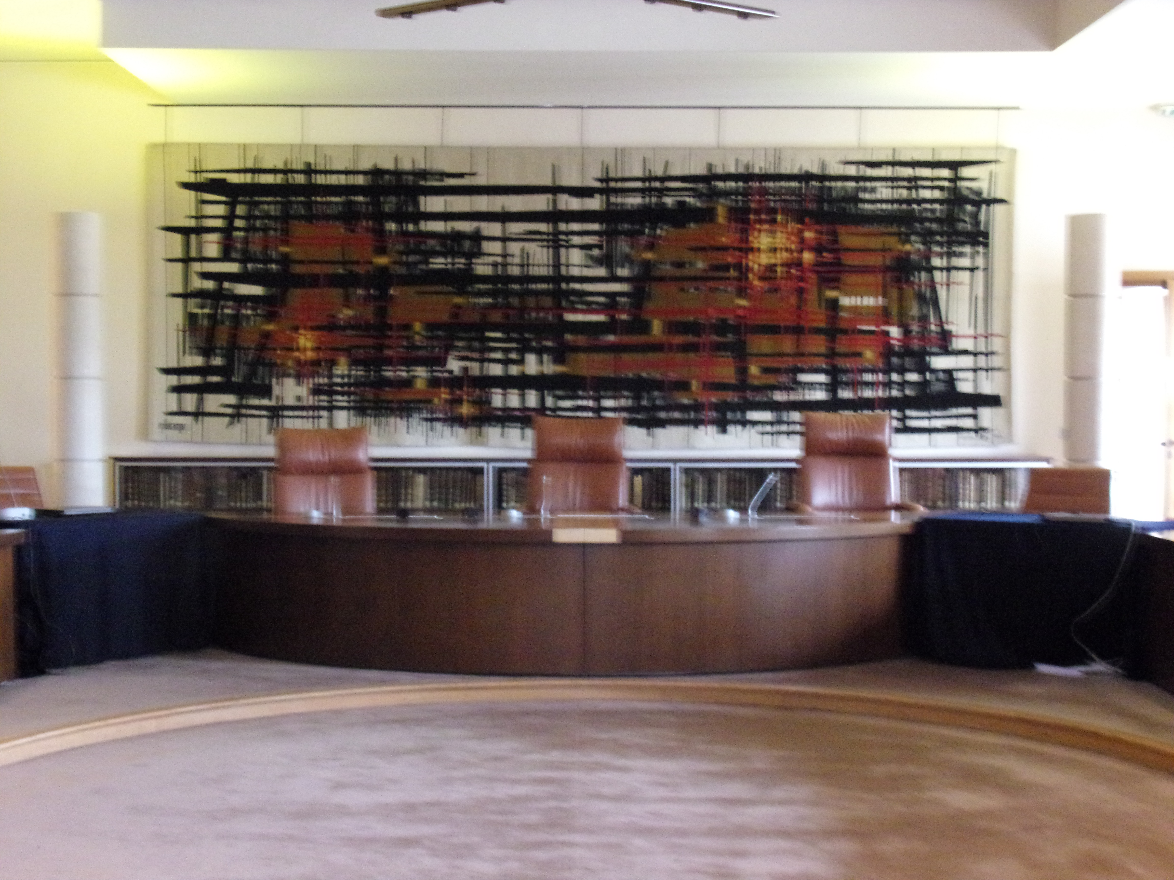 Deuxième chambre civile de la Cour de cassation (l'estrade du président de chambre, du président de section et du doyen) ; photo prise le 14 juin 2019. En arrière-plan, une tapisserie d'art moderne datée de 1965.